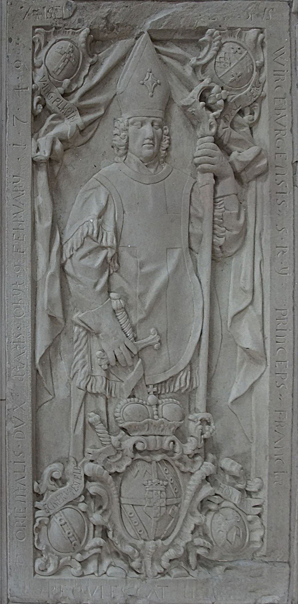 Grablege in der Marienkirche in der Festung Marienburg in Würzburg Anselm Franz von Ingelheim (1746-1749)